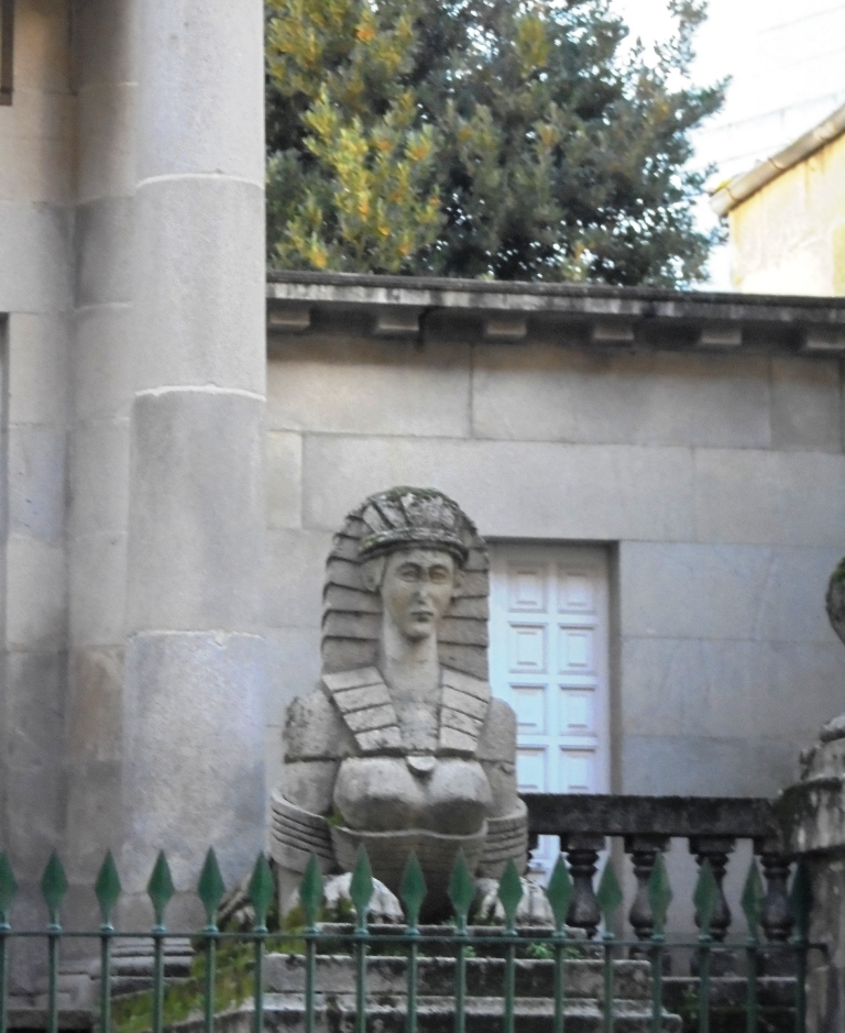 Esfinge de la casa de los Fonseca en Pontevedra capital